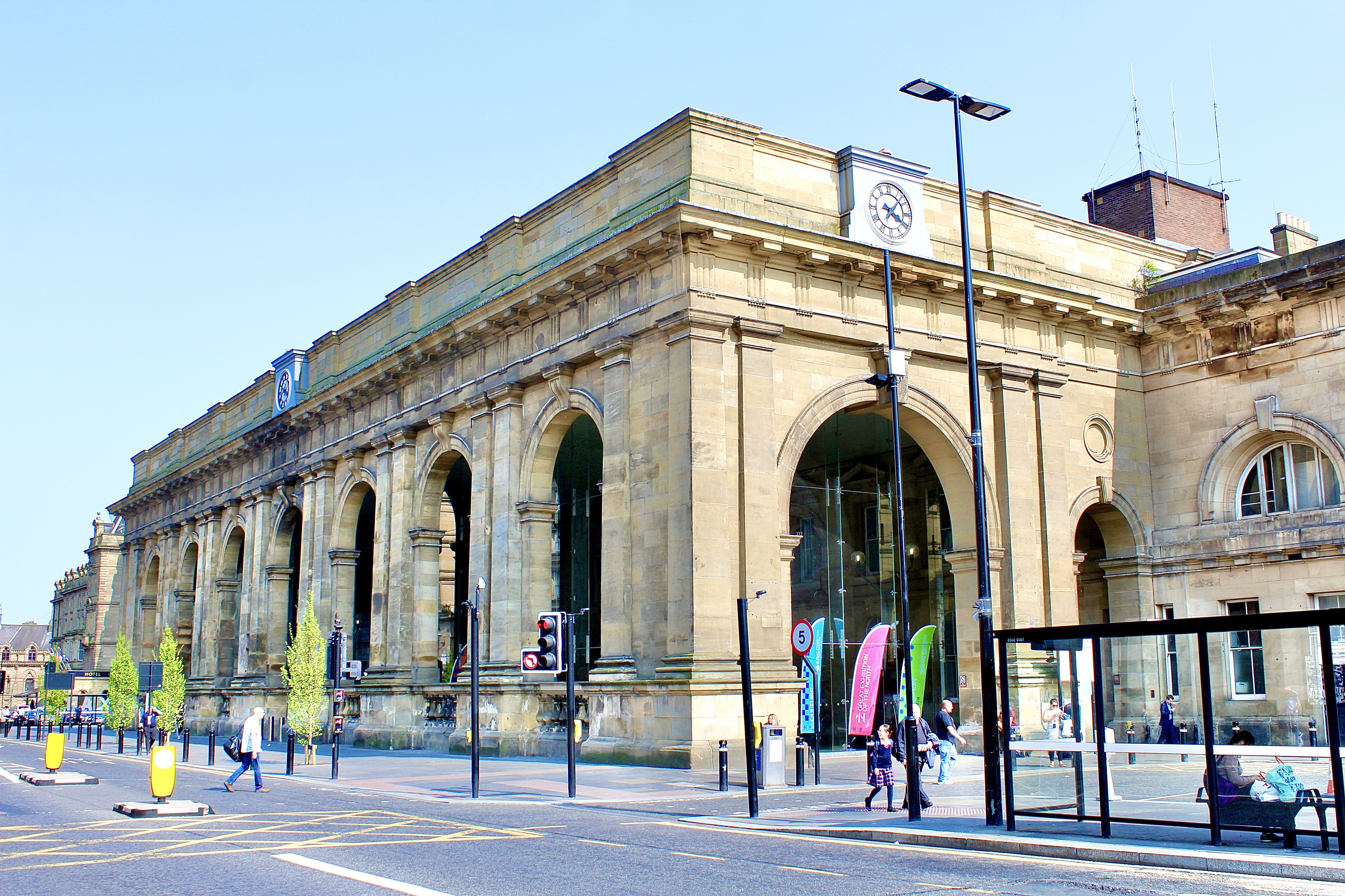 Gare centrale de Newcastle upon Tyne.